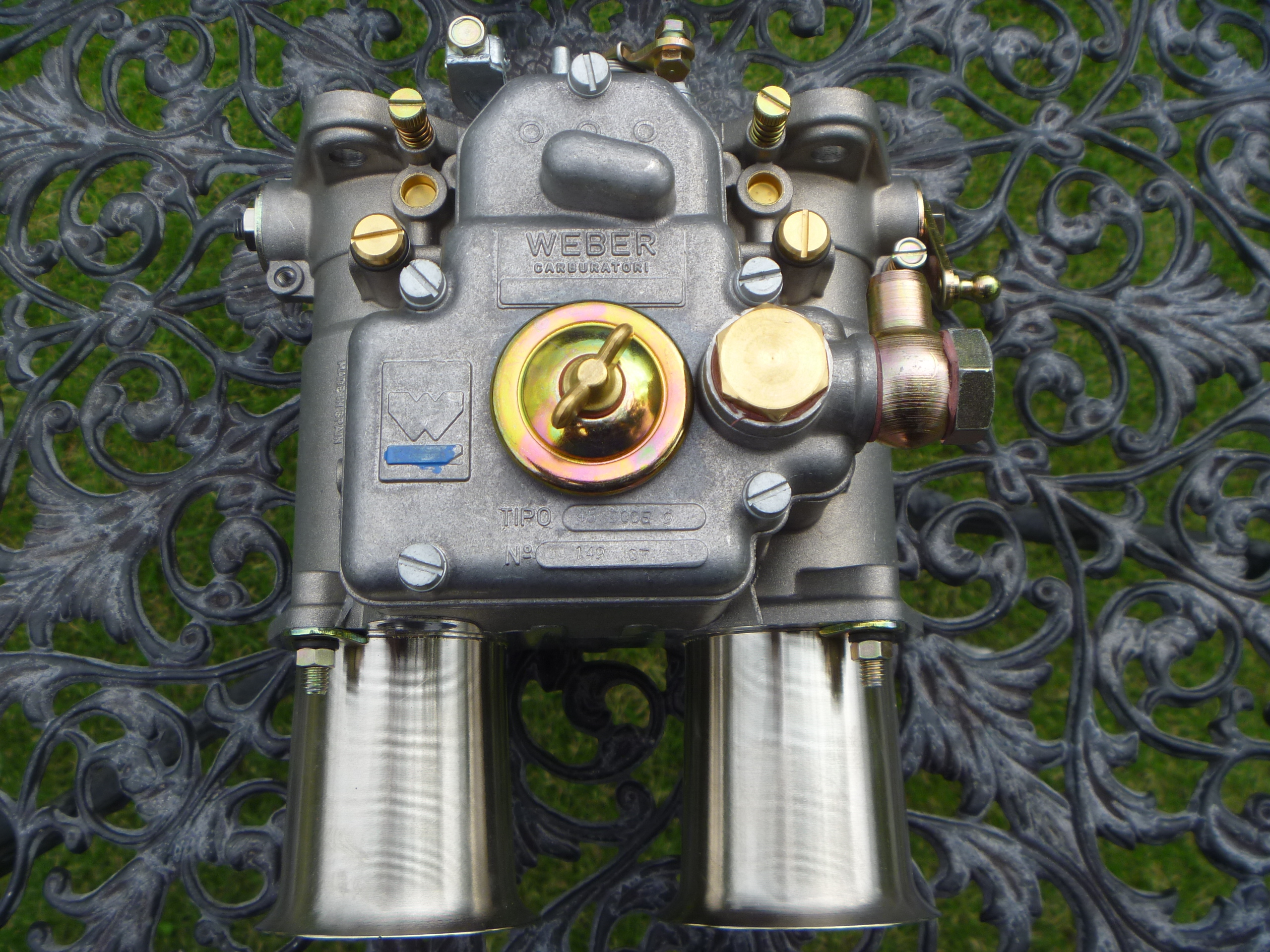 brand new Weber45DCOE9